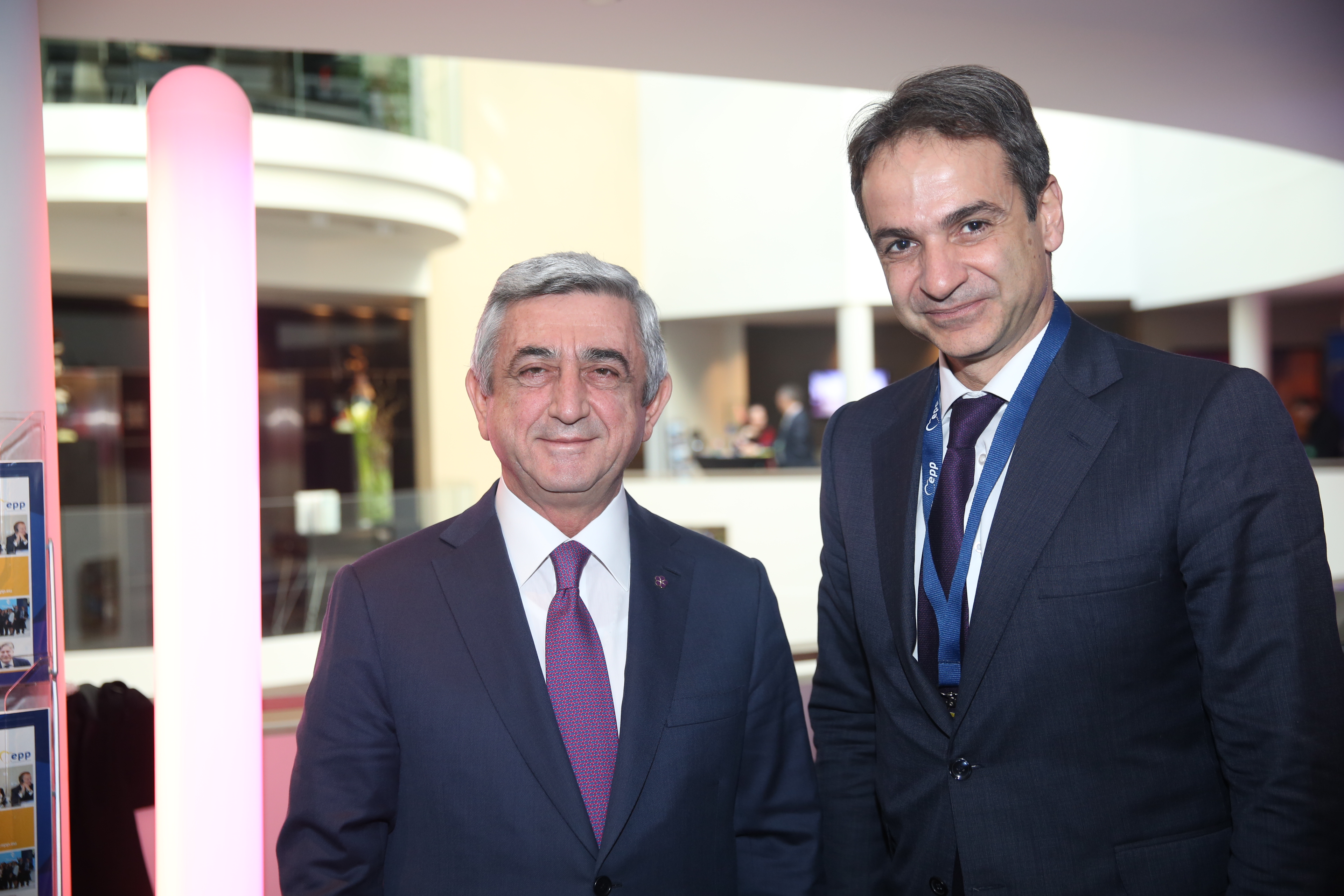 EPP Summit, Brussels, March 2016